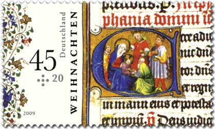 Weihnachtsbriefmarke 2009, Kirchenschätze